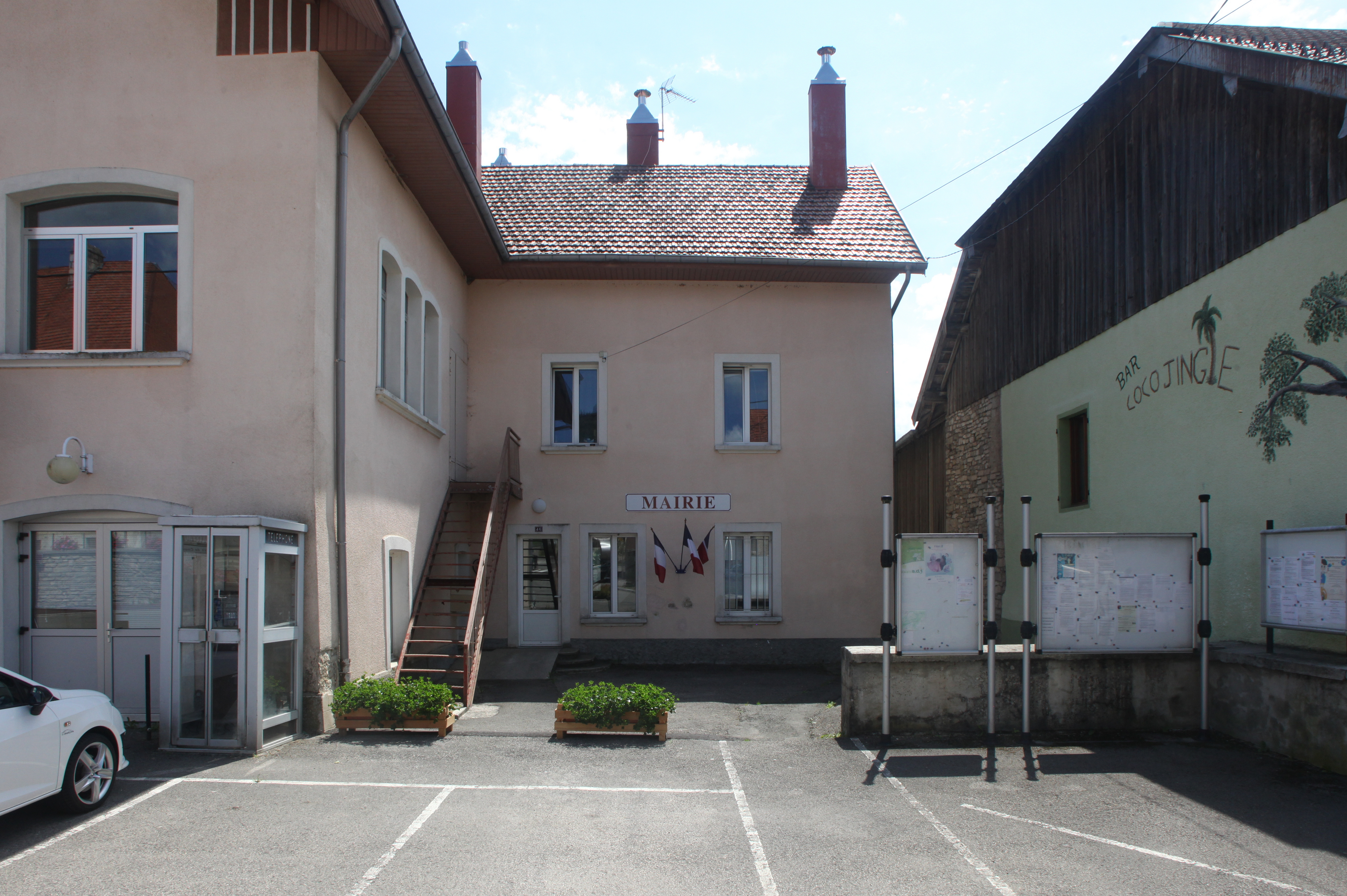 Mairie d'Évillers (Doubs).